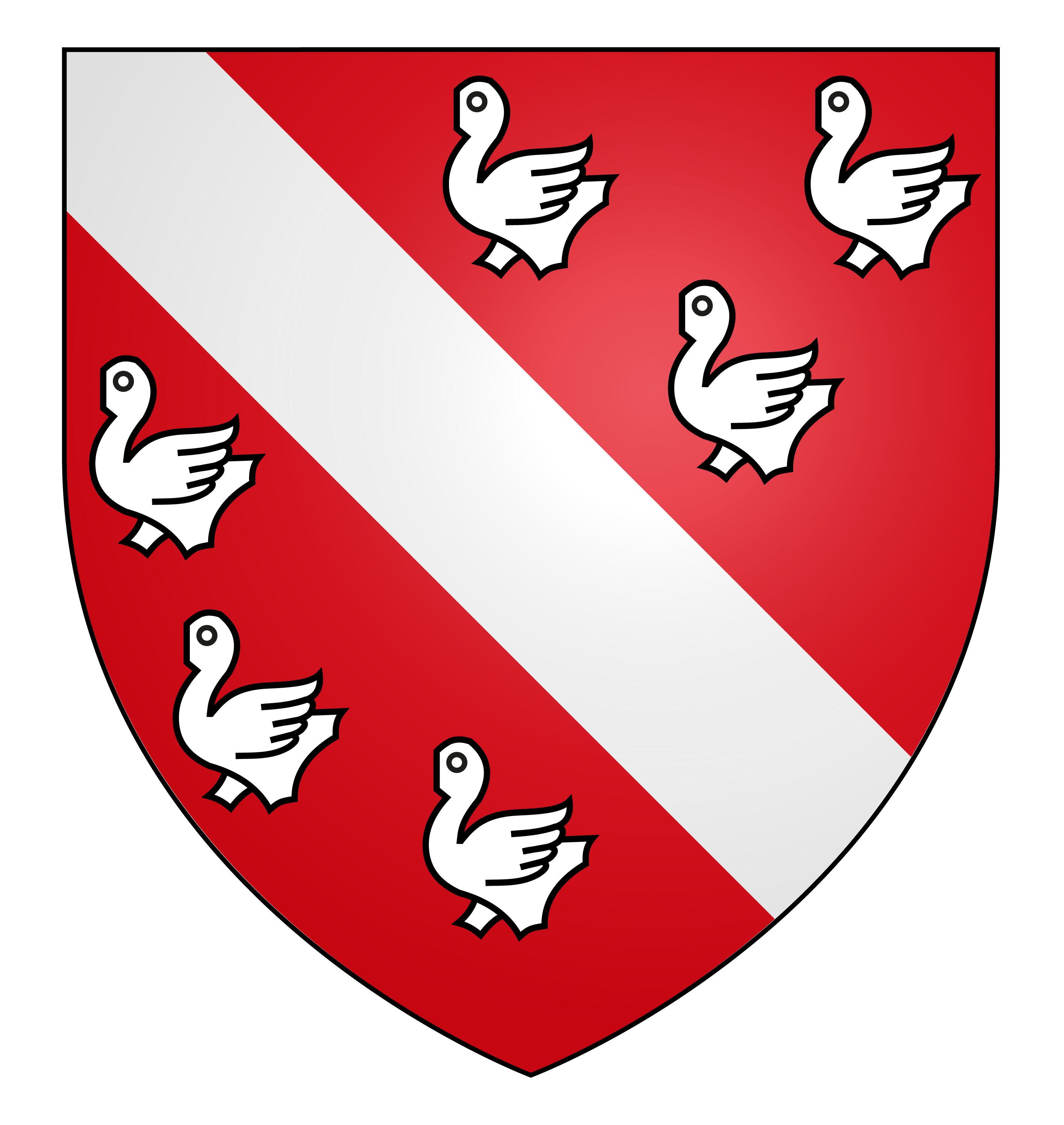 Blason